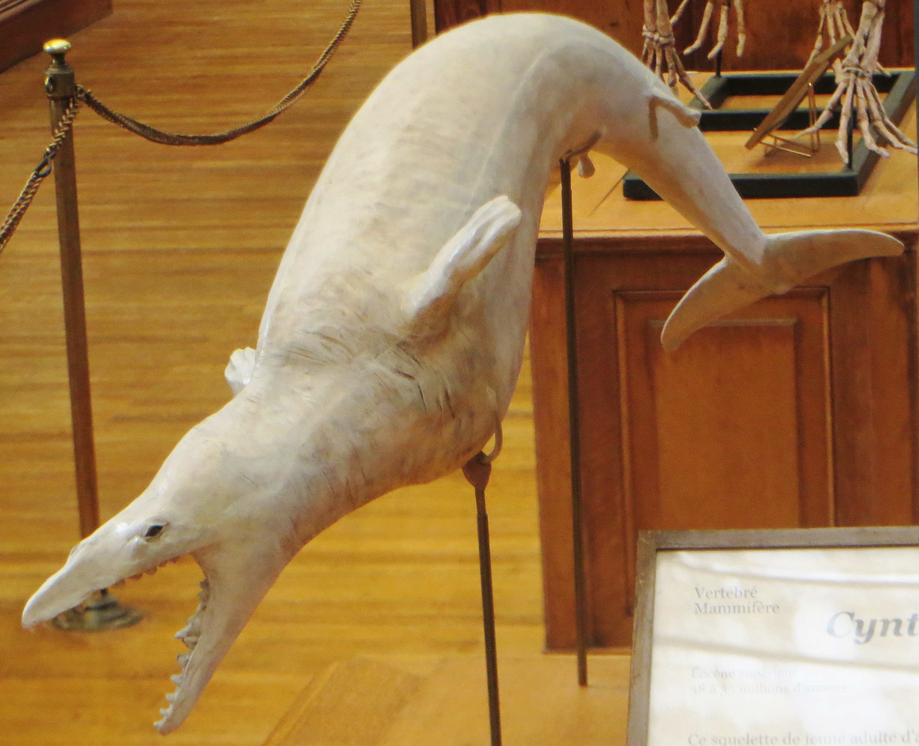 Cynthiacetus recon